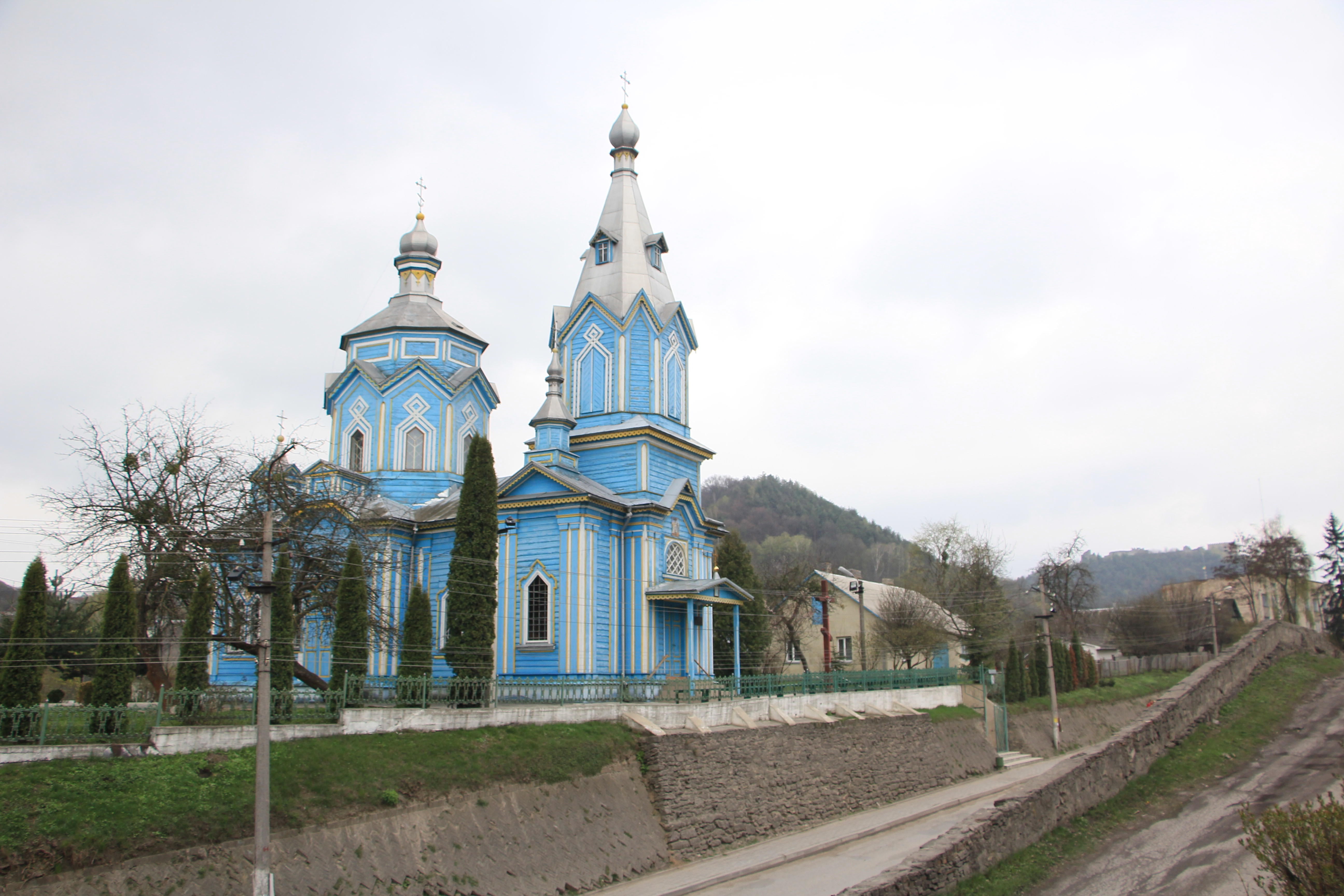 Дерев'яна церква міста Кременець